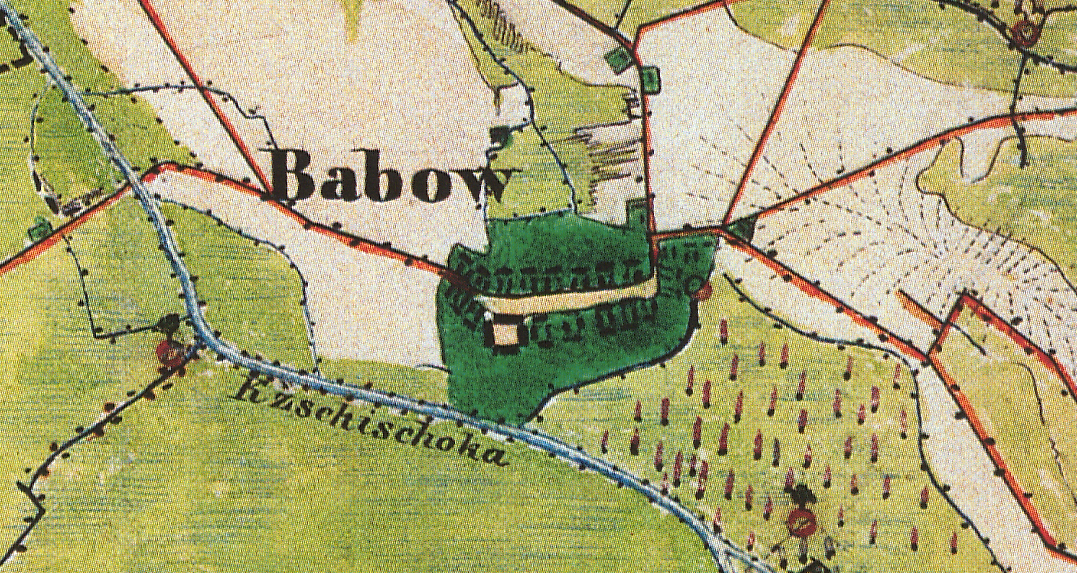 Babow, Ortsteil der Gemeinde Kolkwitz, Lkr. Spree-Neiße, Brandenburg, Ausschnitt aus dem Urmesstischblatt 4250 Vetschau/Spreewald von 1846